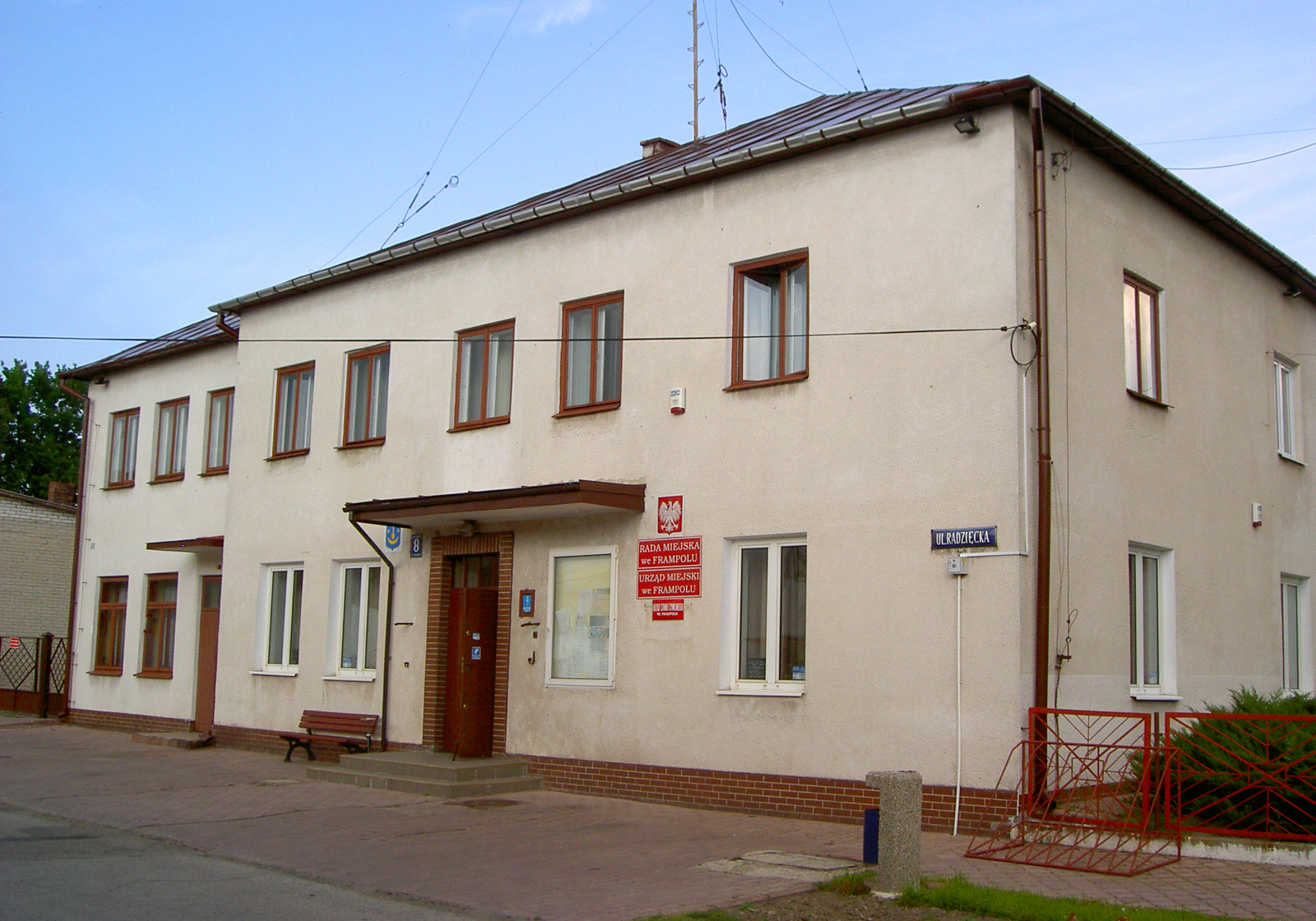 Frampol, Poland • Urząd Miasta i Gminy / City Council